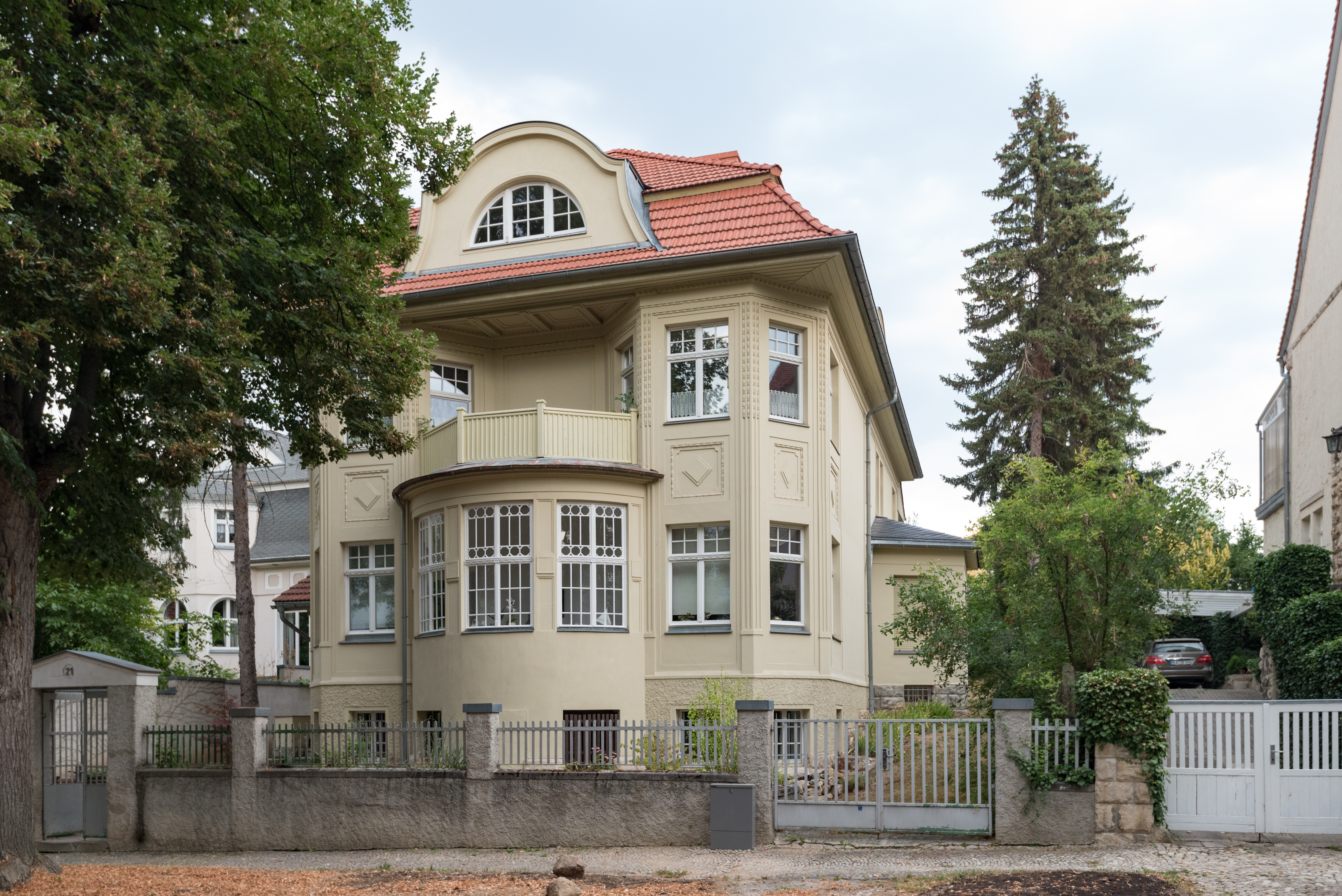 Naumburg (Saale), Buchholzstraße 21